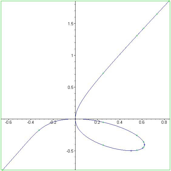 Trident curve